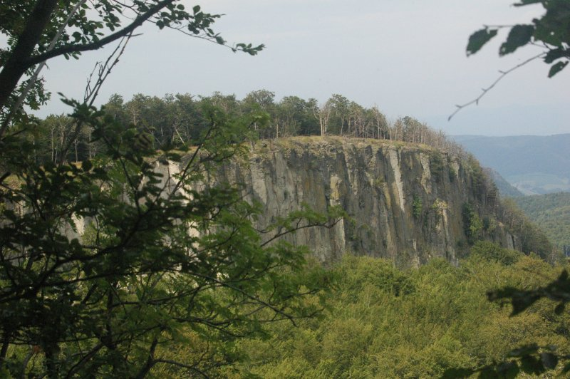 Biely Kameň (Biela skala), Vtáčnik